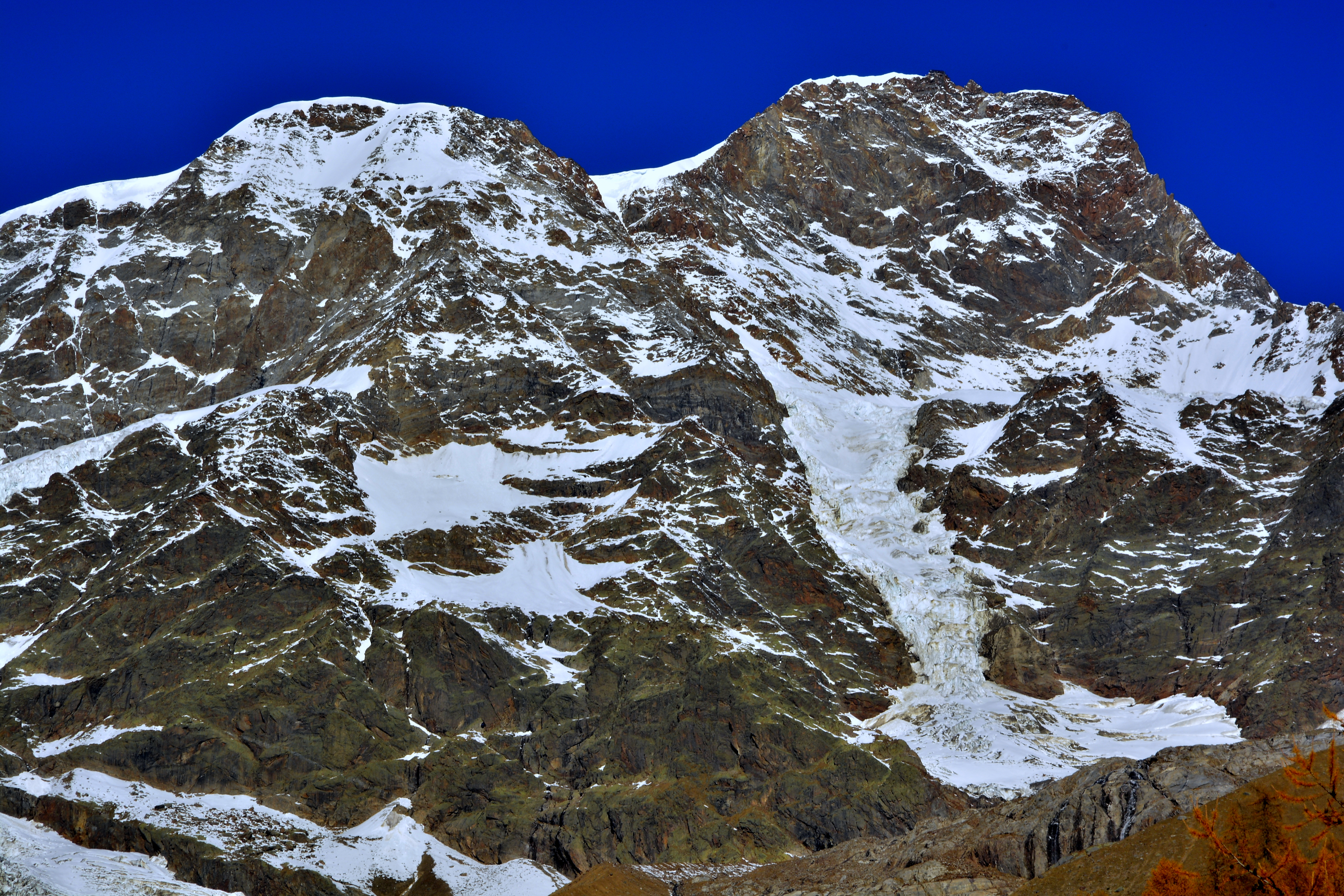 La parete valsesiana del Monte Rosacon la Punta Parrot m.4436 a sinistra e la Punta Gnifetti m.4559 a destra.